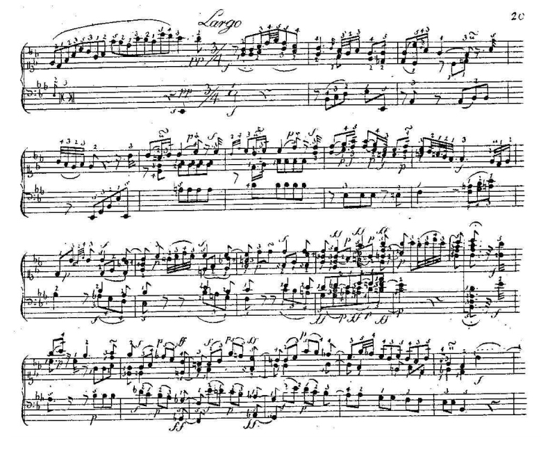 Probestücke from Versuch über die wahre Art das Clavier zu spielen. Sonata VI, mvt. 3 (fantasia), middle section